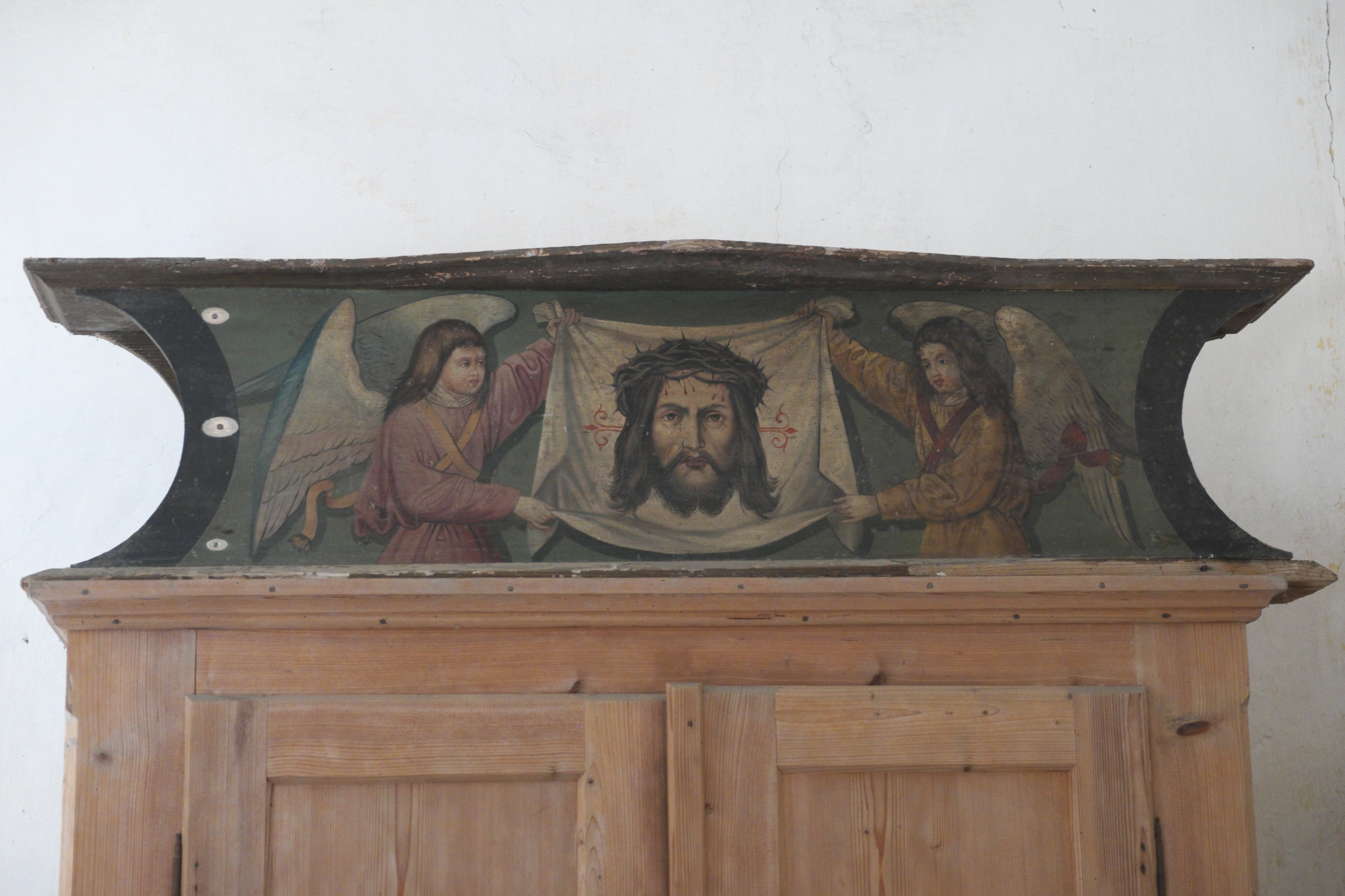 Katholische Filialkirche Unsere Liebe Frau in Gasseltshausen (Aiglsbach) im niederbayerischen Landkreis Kelheim (Bayern/Deutschland), ursprüngliches Gemälde der Predella des Altars im Untergeschoss, um 1530; Darstellung: Schweißtuch der Veronika